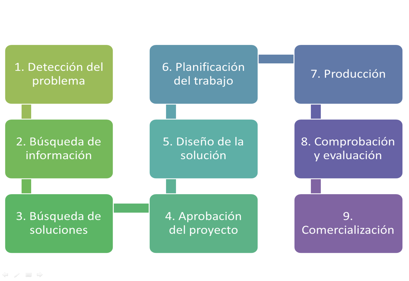 Las 9 fases del proceso tecnológico: desde la detección de un problema hasta la comercialización de un producto que lo resuelva.